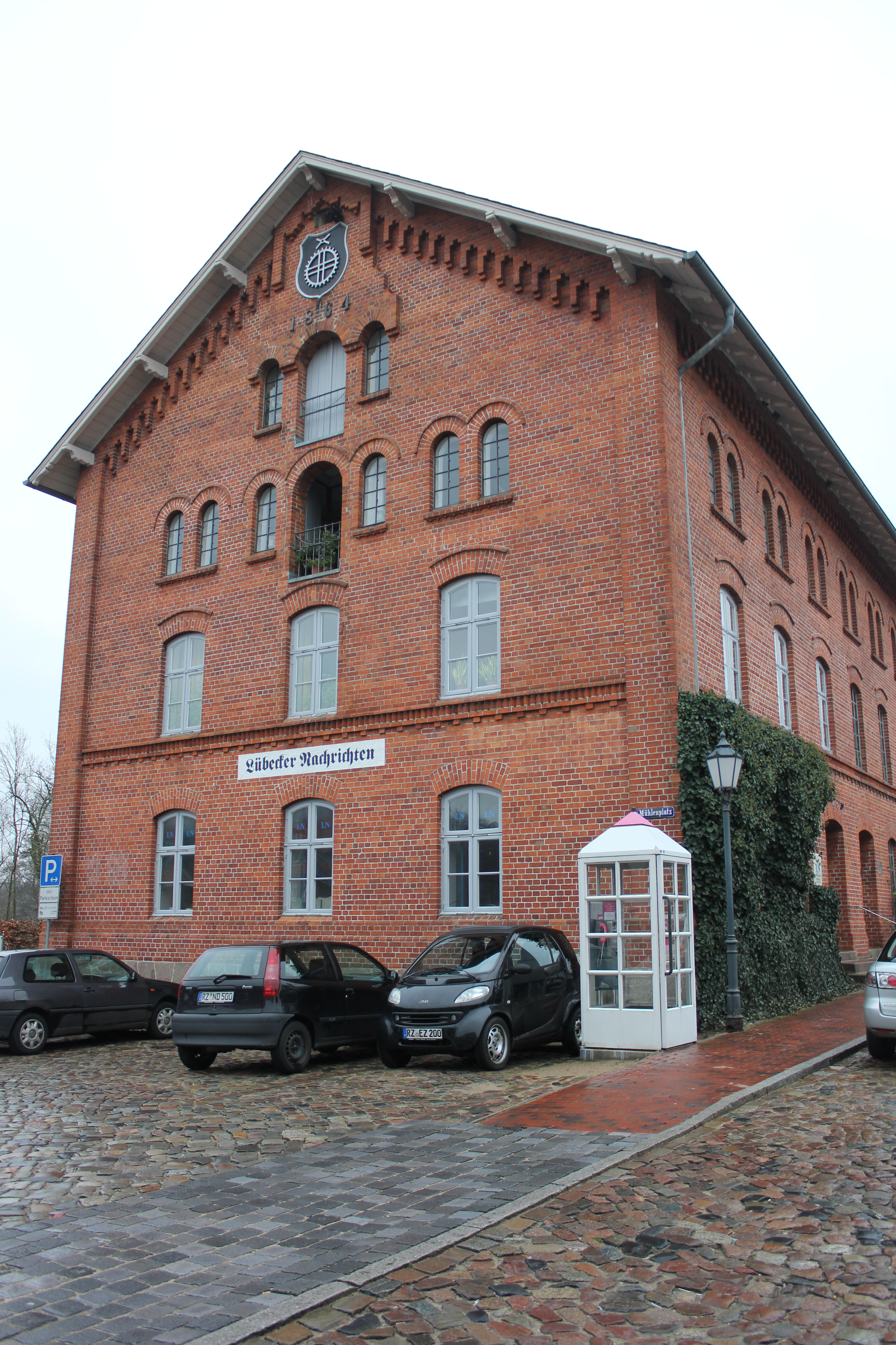 Standort der Lokalredaktion der Lübecker Nachrichten - Ausgabe der Lauenburgischen Nachrichten in Mölln in der Stadtmühle am Mühlenplatz 9